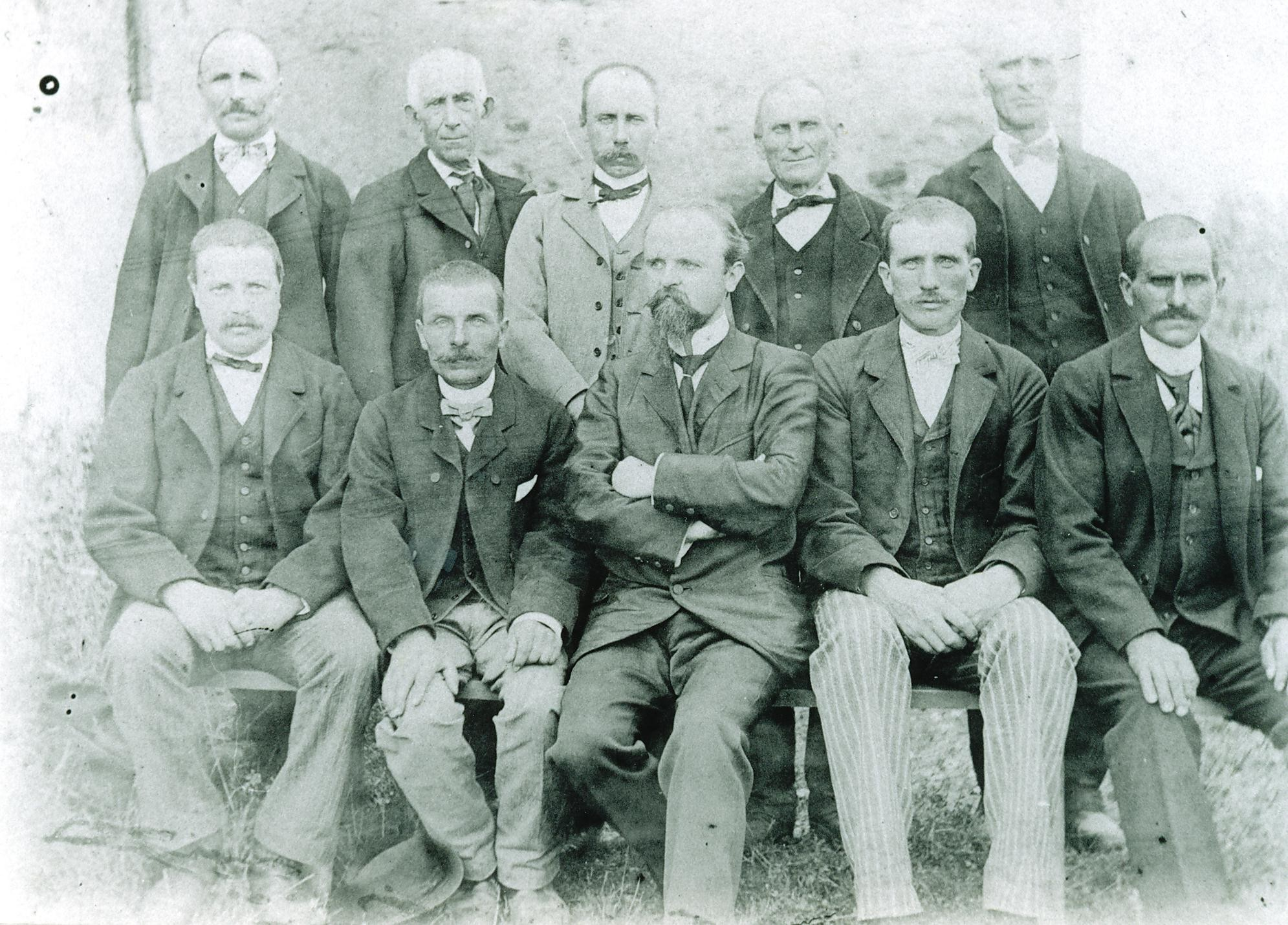 Héliodore Jospin assis au cntre bras croisés